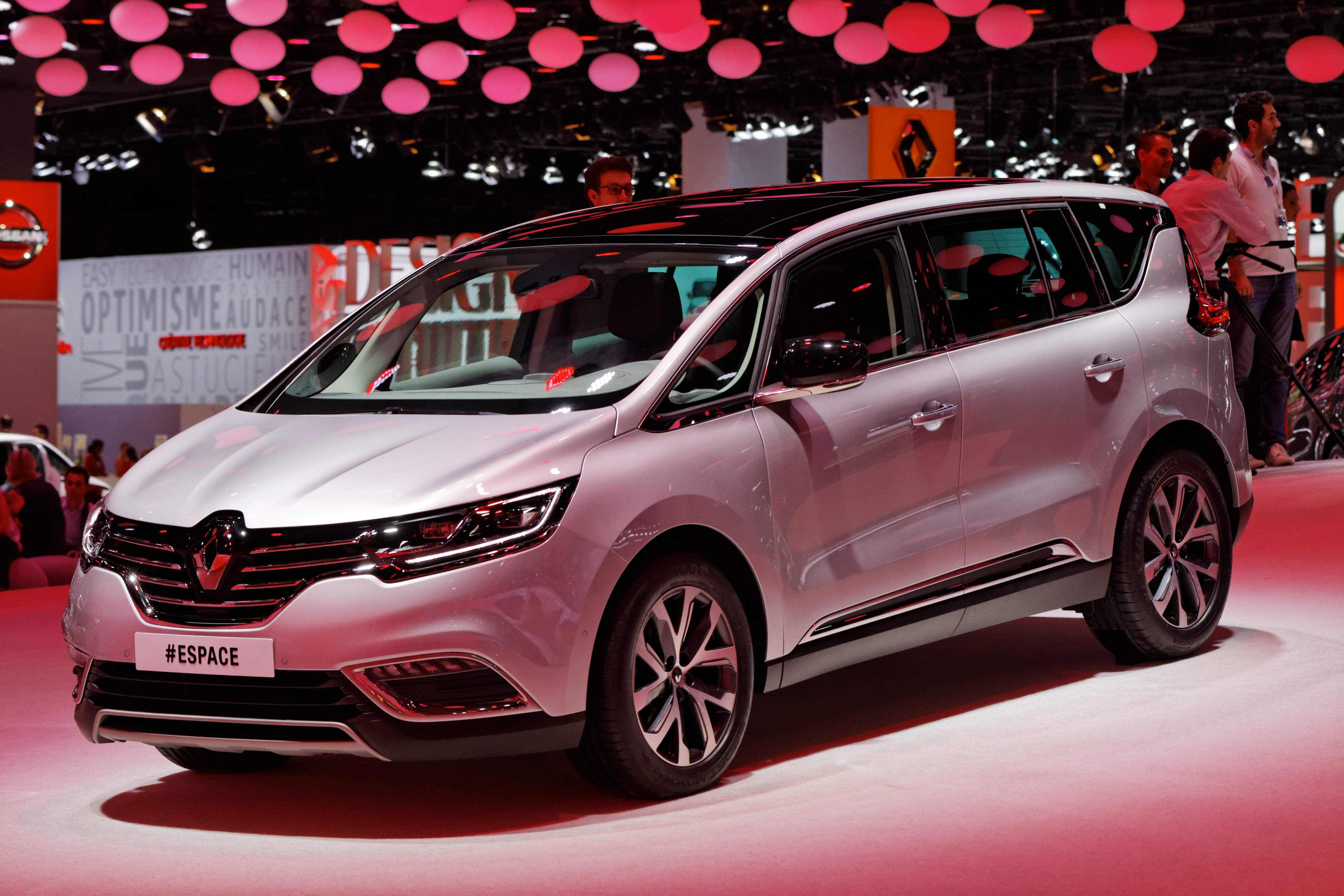 Le Renault Espace V présenté lors du Mondial de l'Automobile de Paris 2014.